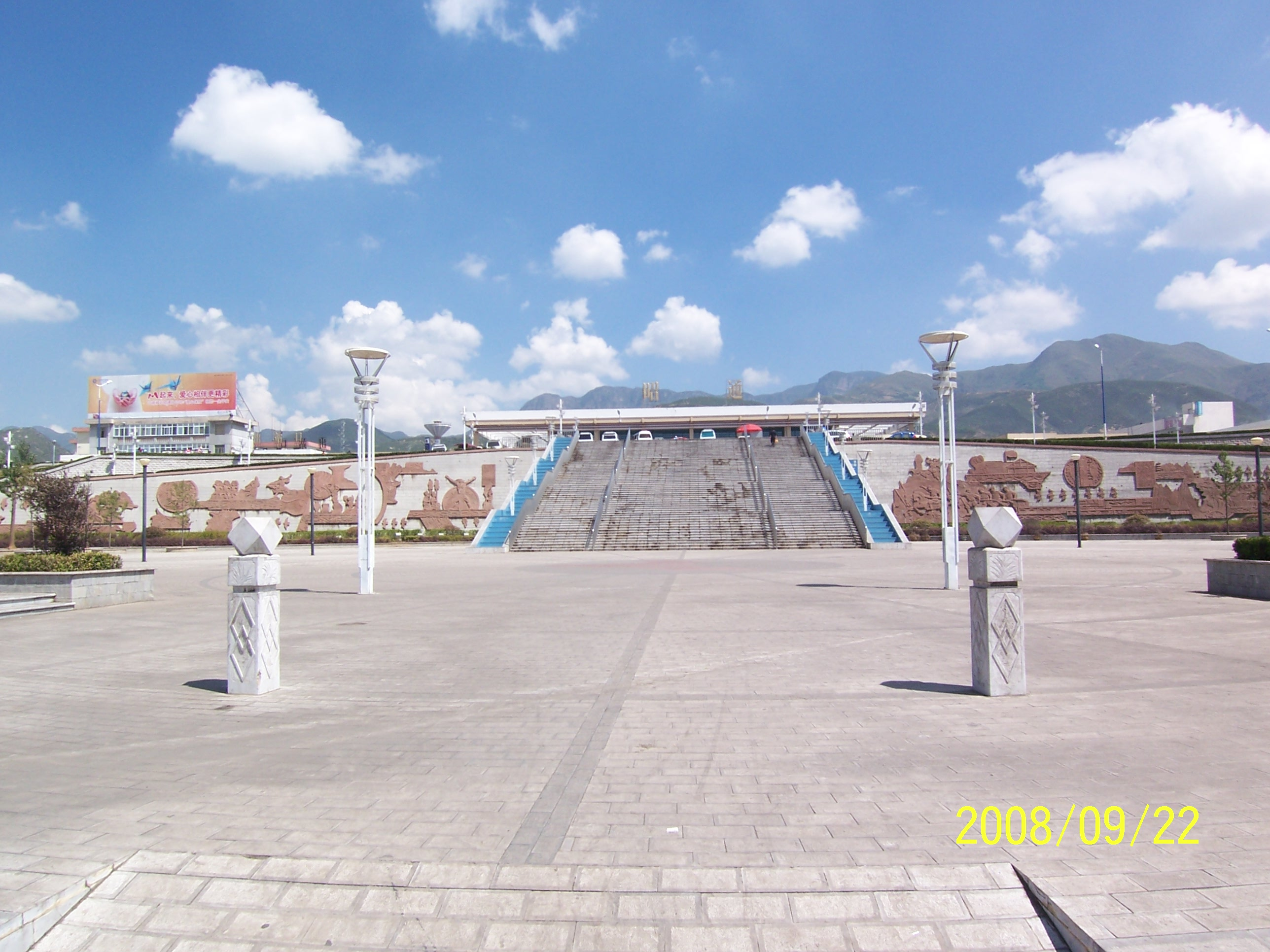 火车站广场